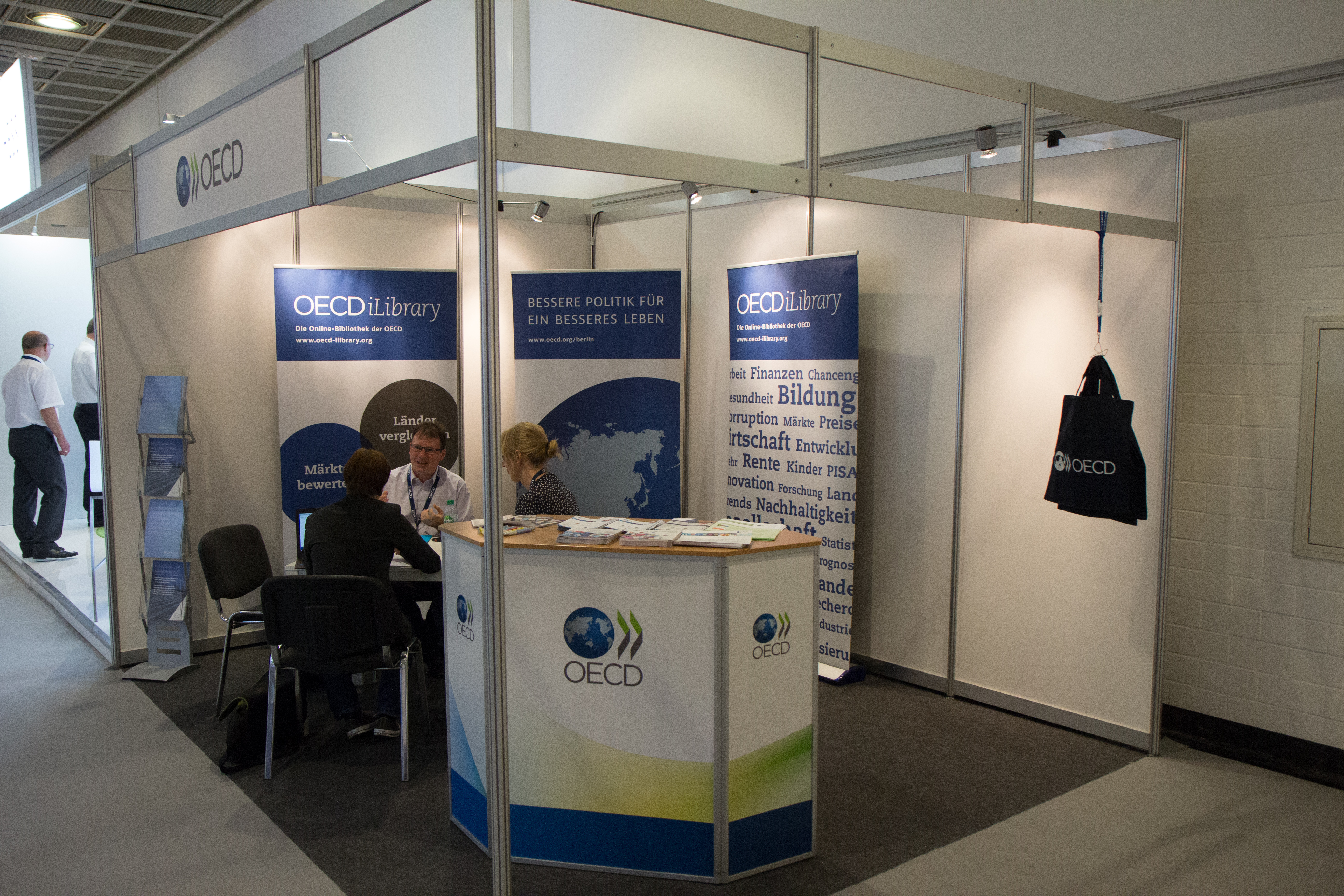 106. Deutscher Bibliothekartag in Frankfurt/Main